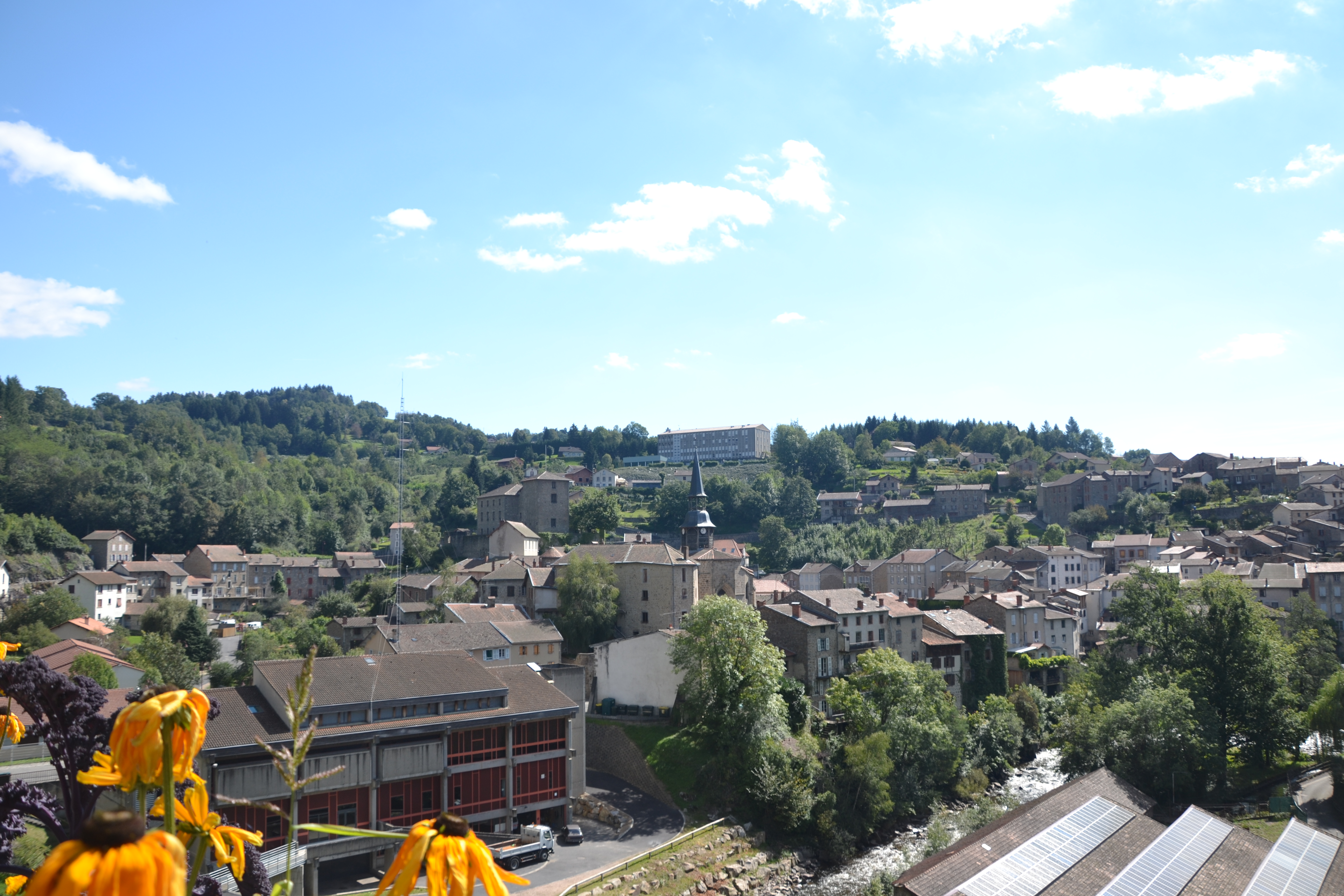 vue sur le village d'Olliergues